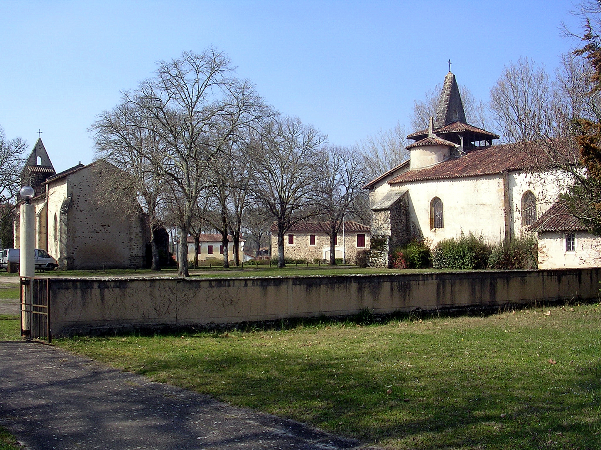 Les deux églises de Moustey (Saint Martin à gauche, Notre-Dame à droite) dans le département français des Landes